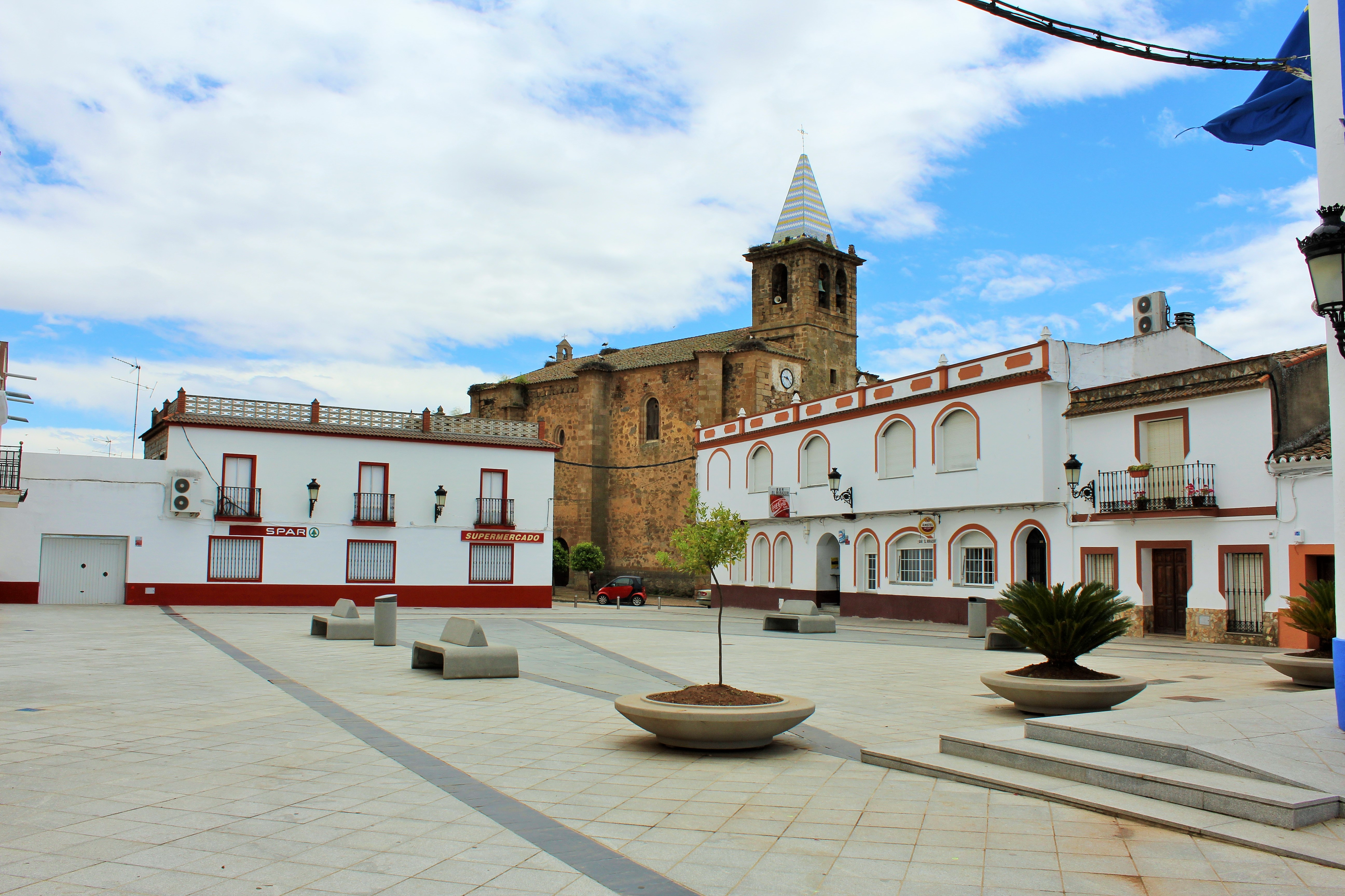 Plaza mayor de Valverde de Mérida